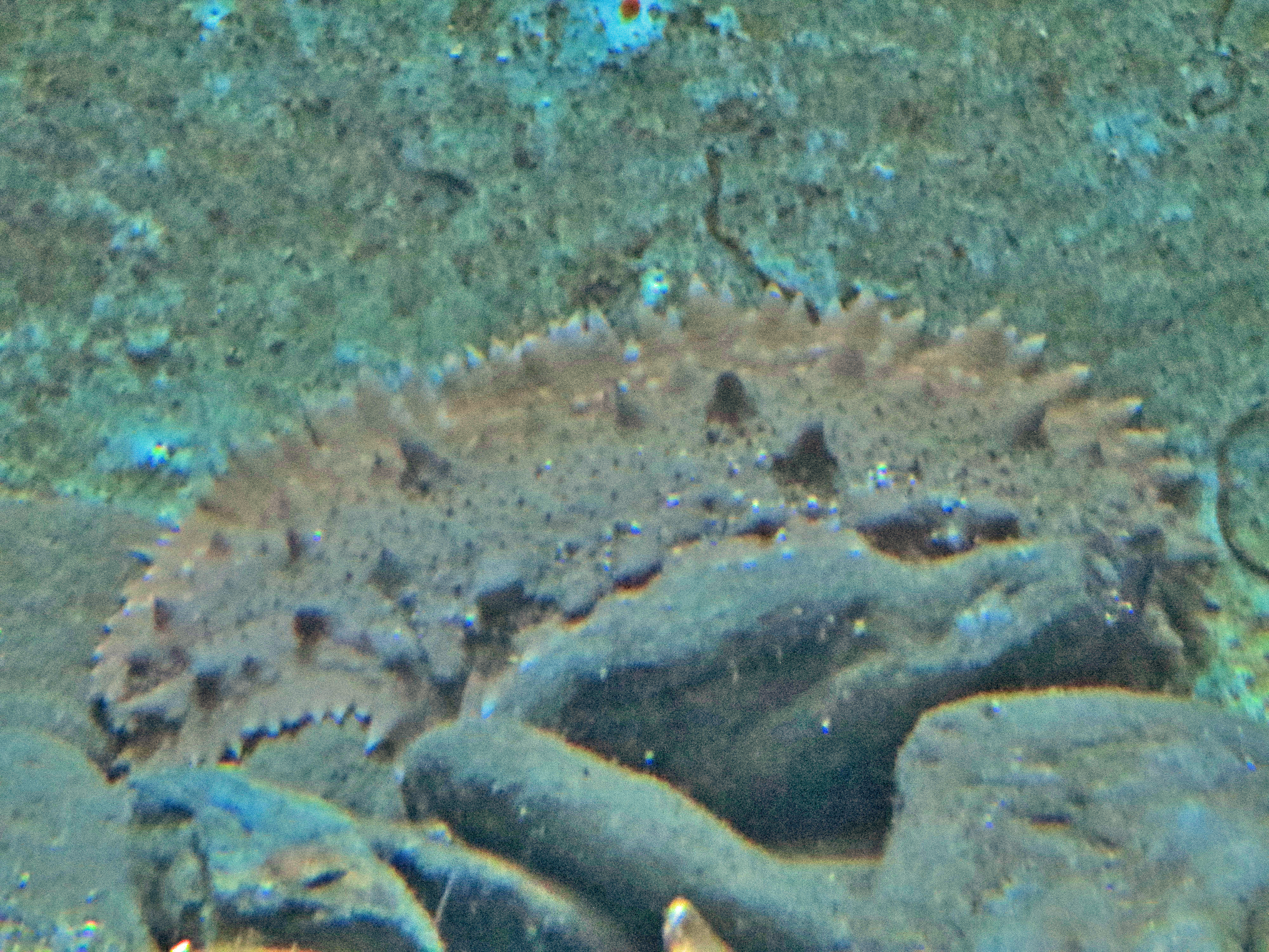 Une holothurie jaune (Parastichopus regalis) au Biodiversarium de l'Observatoire océanologique de Banyuls-sur-Mer.